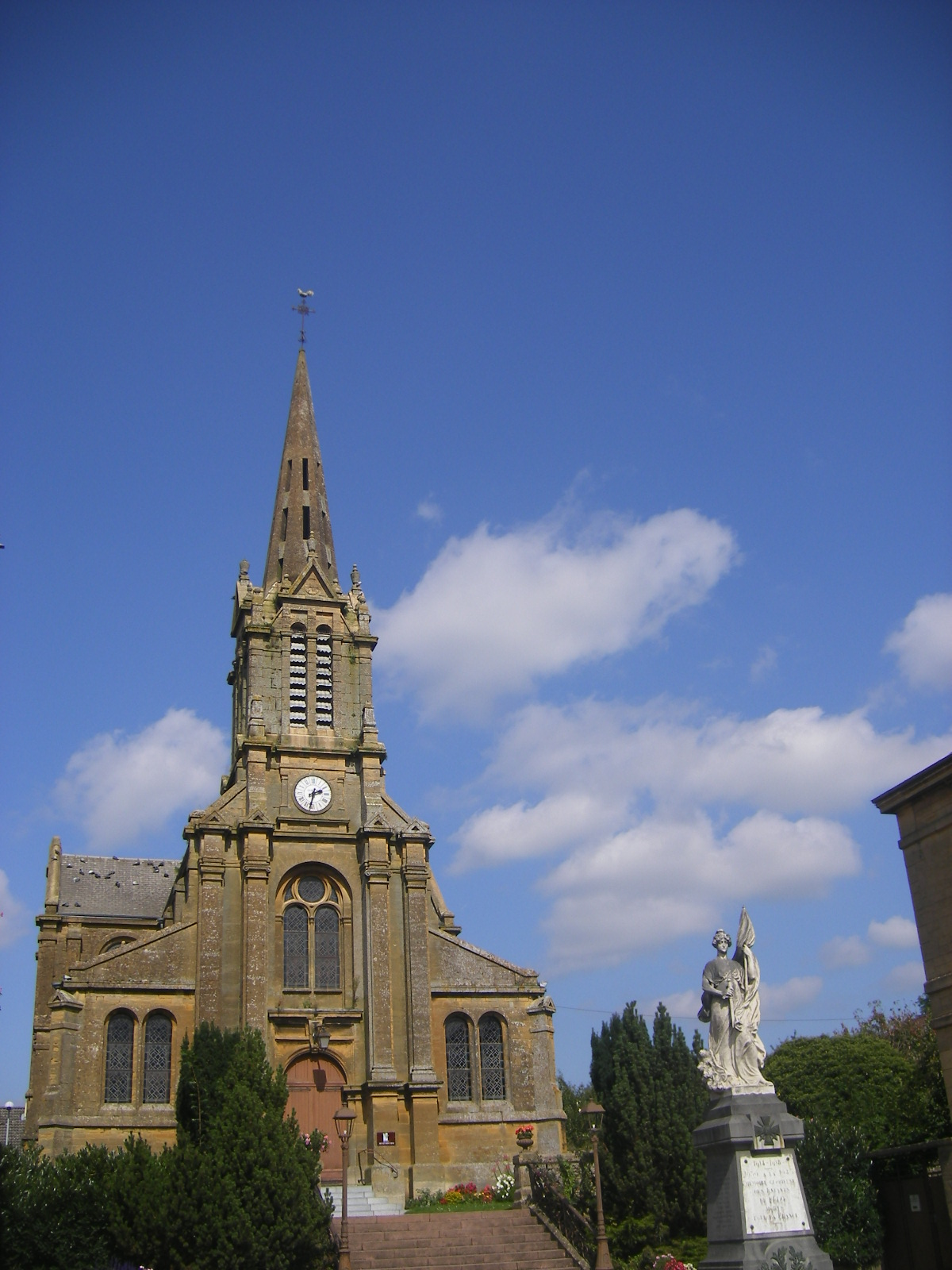 Flize